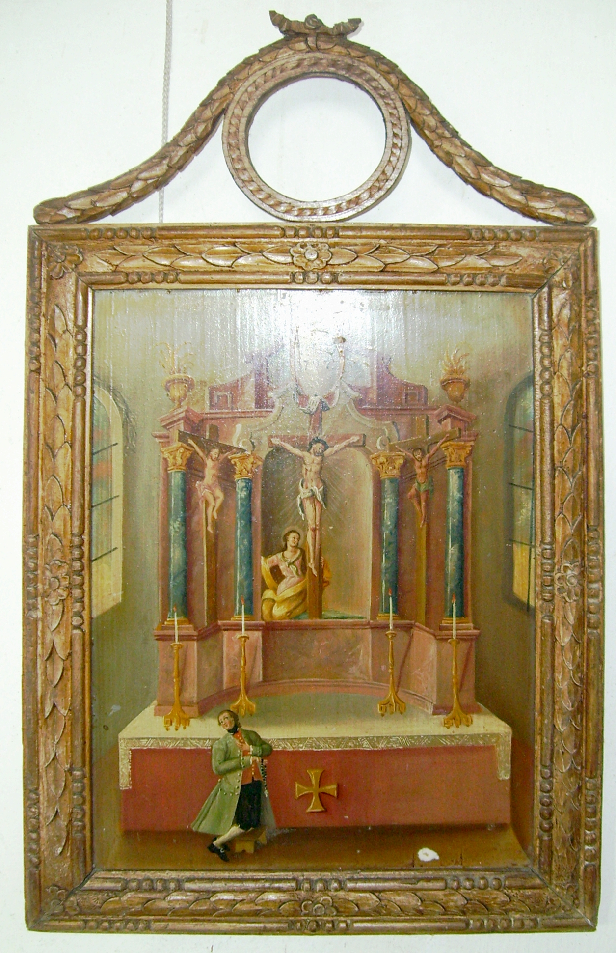 Votivtafel. Leider ist bei dieser Aufnahme die Jahreszahl (1797) in der oberen Mitte nicht zu sehen .